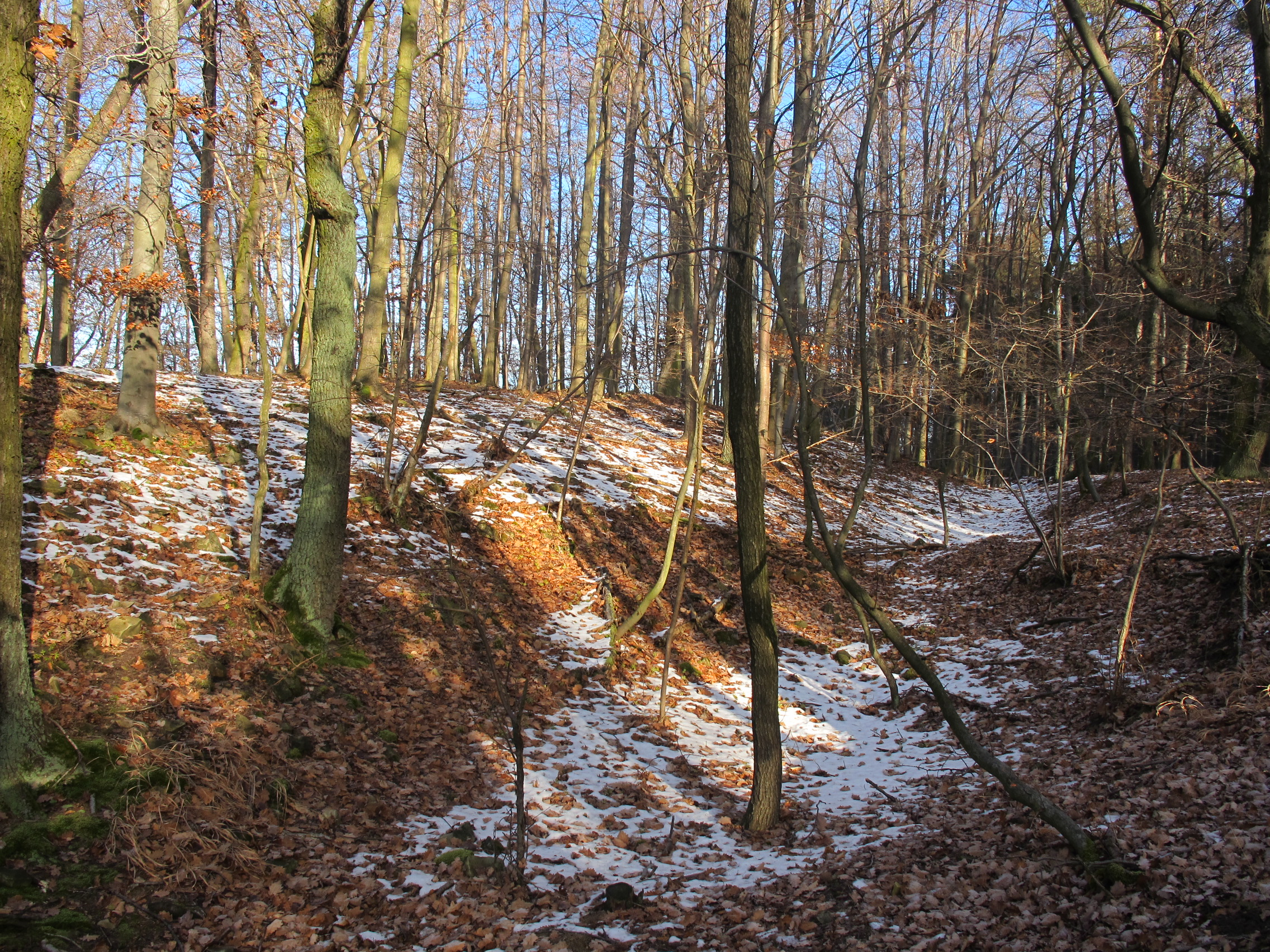 Hřivice - hradiště